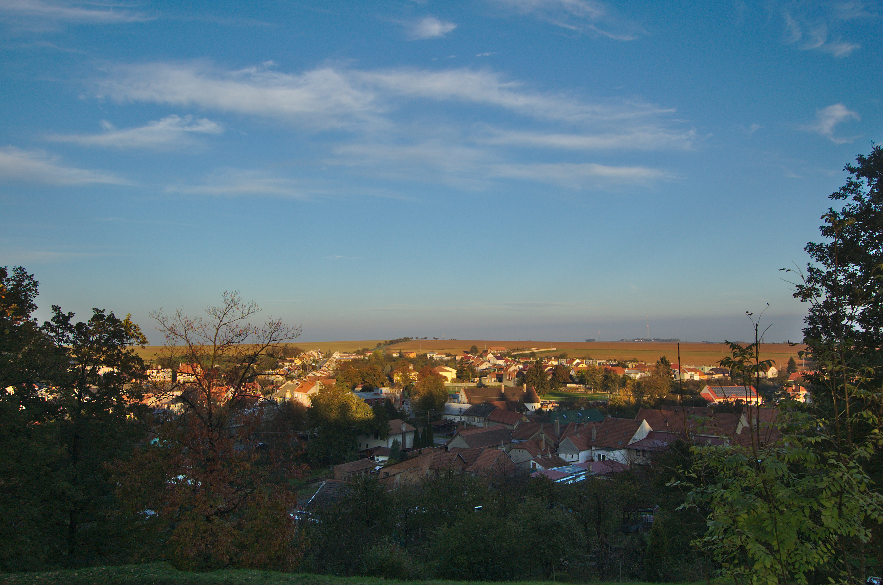 Pohled do vesnice, Otaslavice, okres Prostějov